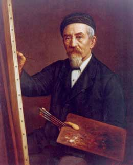 New Zealand artist Gottfried Bohumir Lindauer